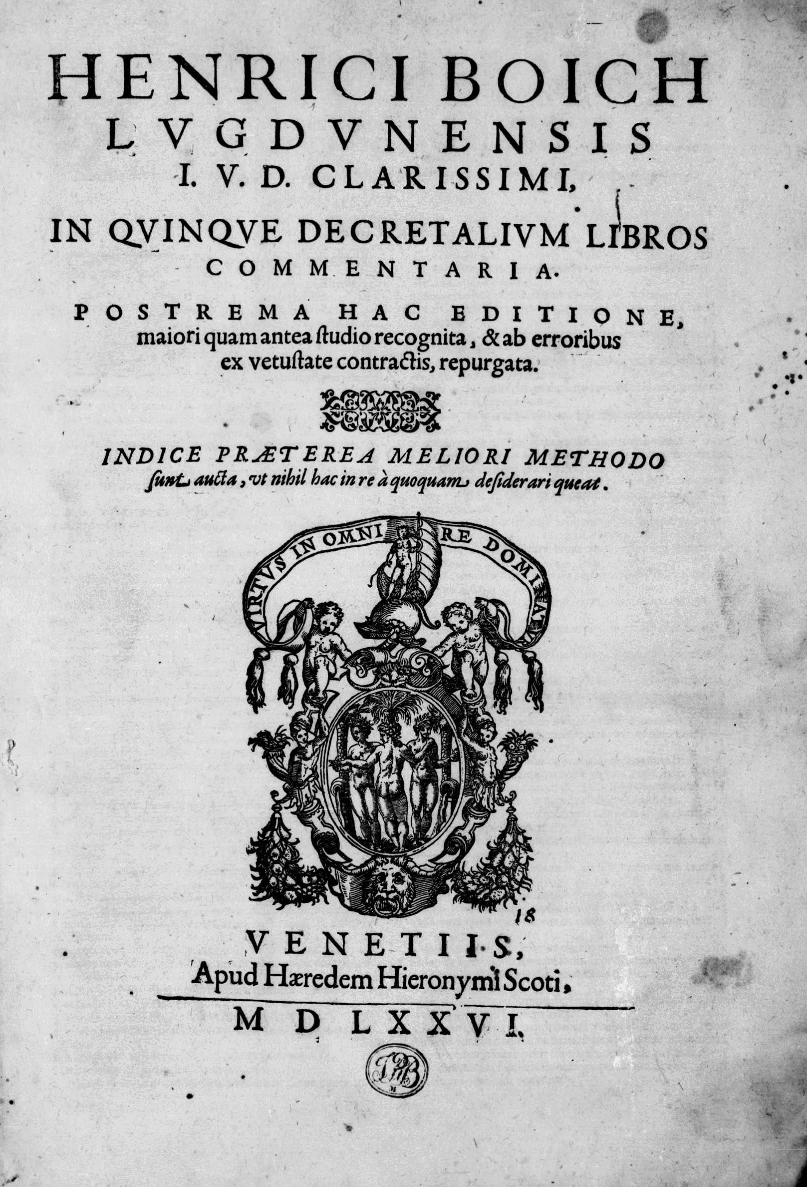 Frontespizio